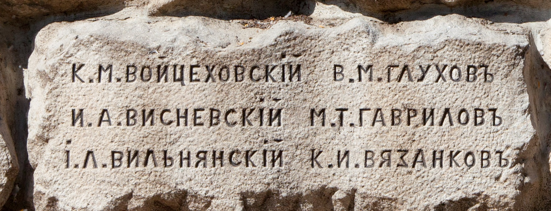 Sofia; Doktorska gradina ( = Doktor-Park = Ärzte-Park)